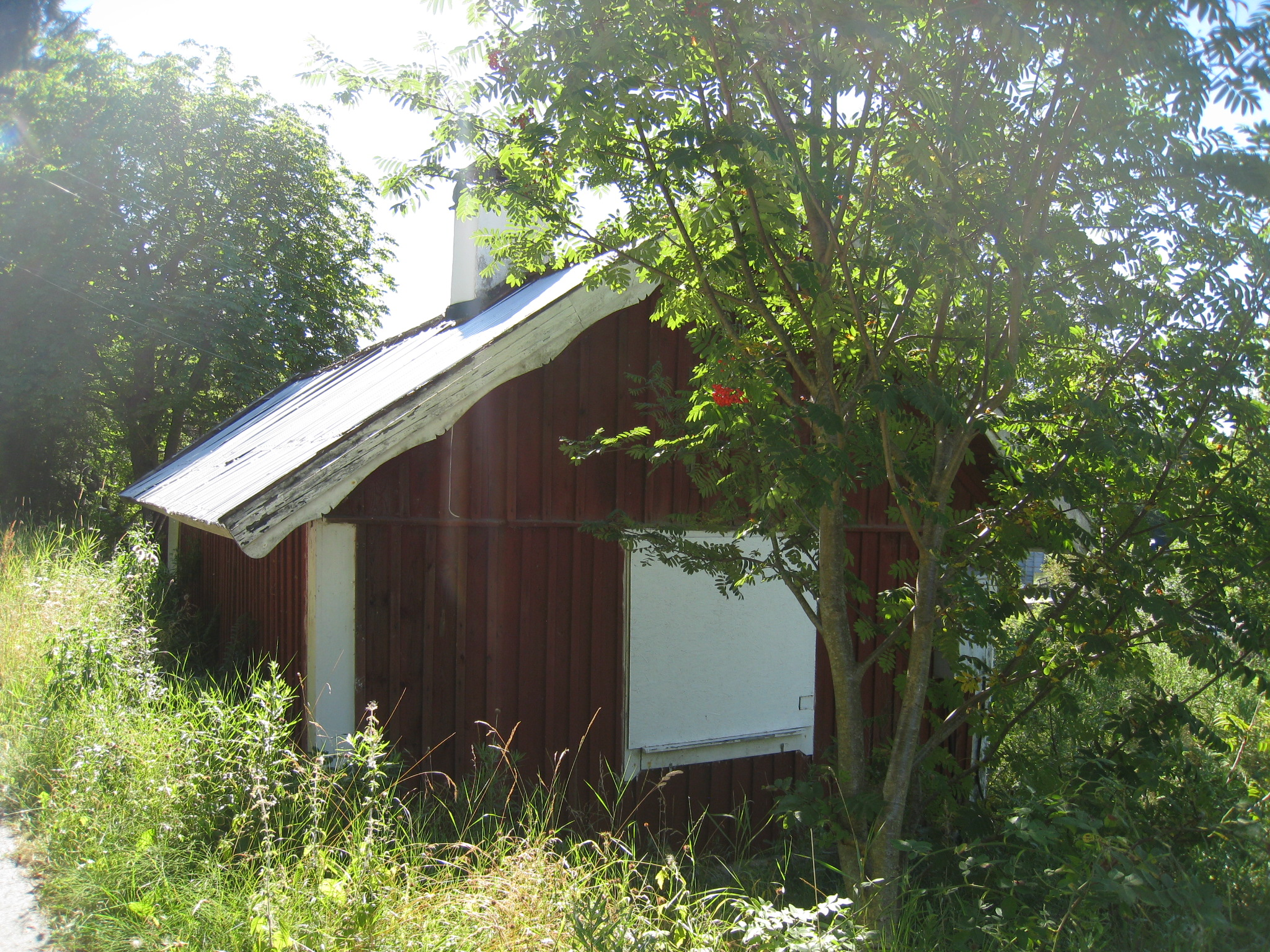 Vattenverksvägen 10 ligger väster om Viksjö i Järfälla kommun. Huset ligger granne med Sanduddens torp, som sedan 1984 är en konstgård med café. Sandudden ligger invid Skäftingesundet vid Mälaren, där broarna går över till Skäftingeholmen.